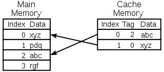 A write-through cache with no-write allocation